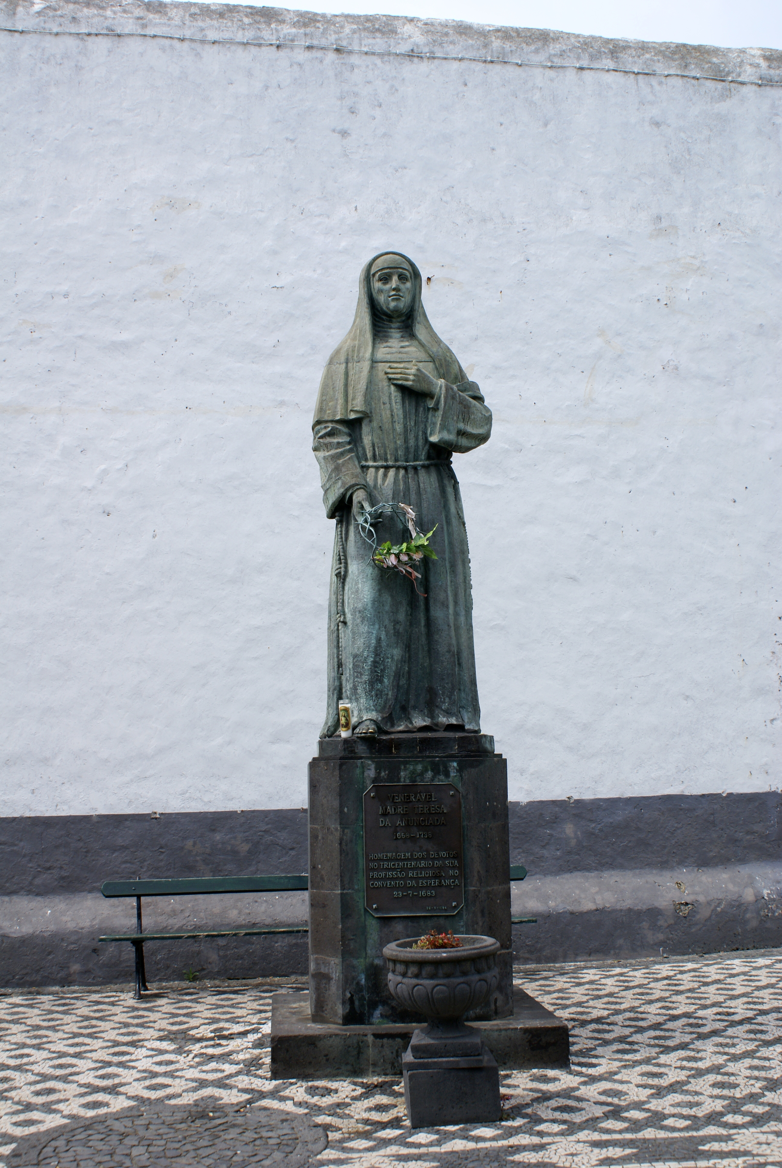 Madre Teresa da Anunciada, Ponta Delgada, ilha de São Miguel, Açores